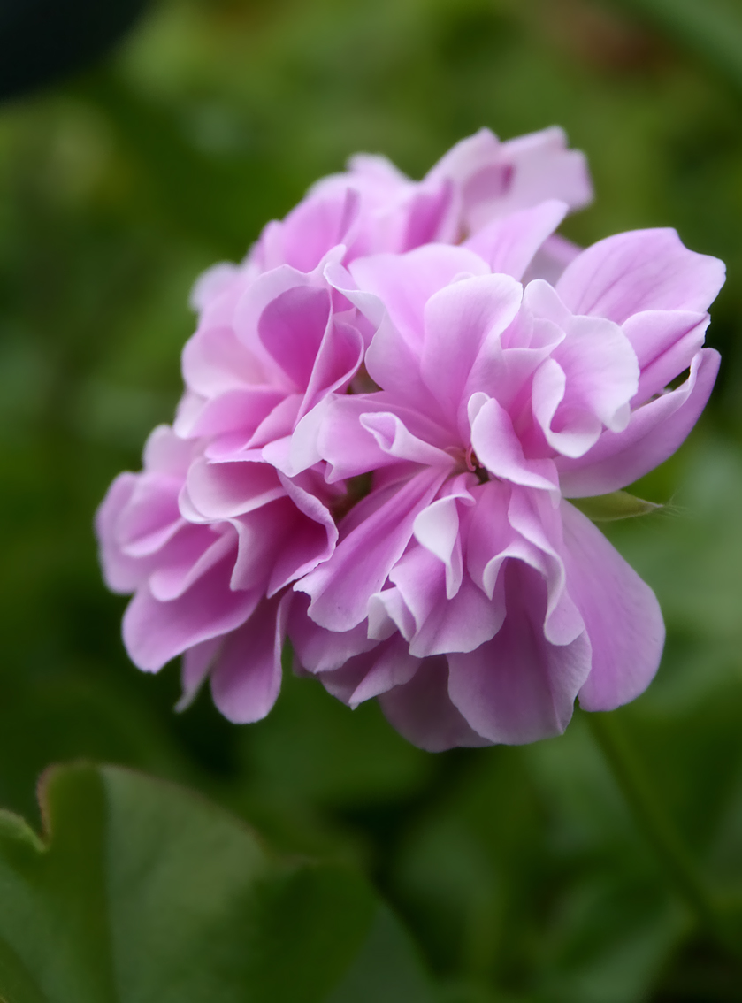 A little pink Pelargonium.